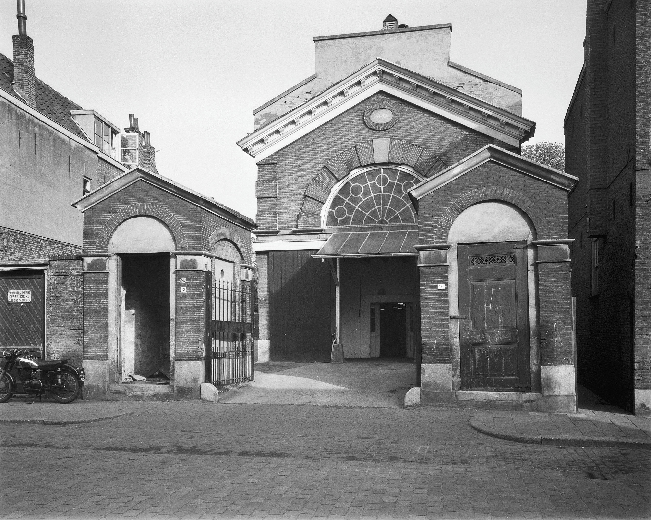 v.m. Synagoge: overzicht voorgevel